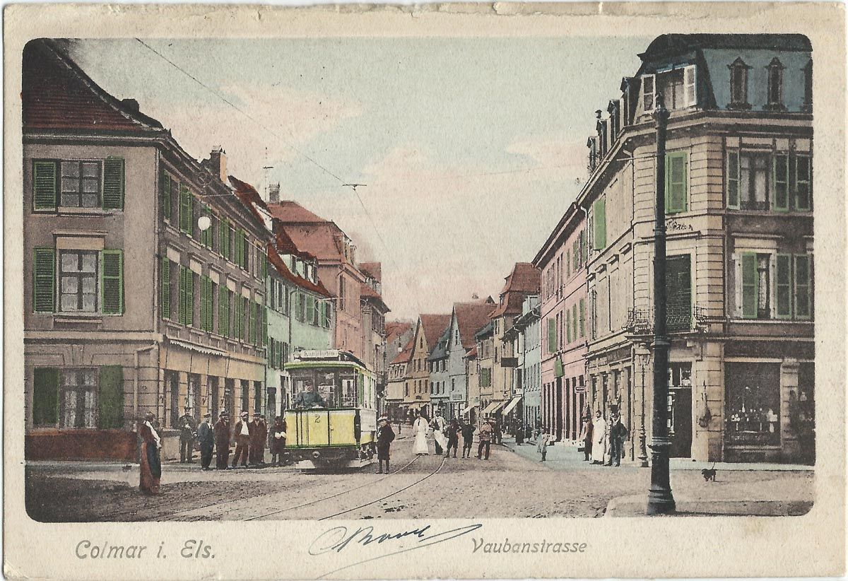 Vue de Colmar au début du XXe siècle (carte postale).